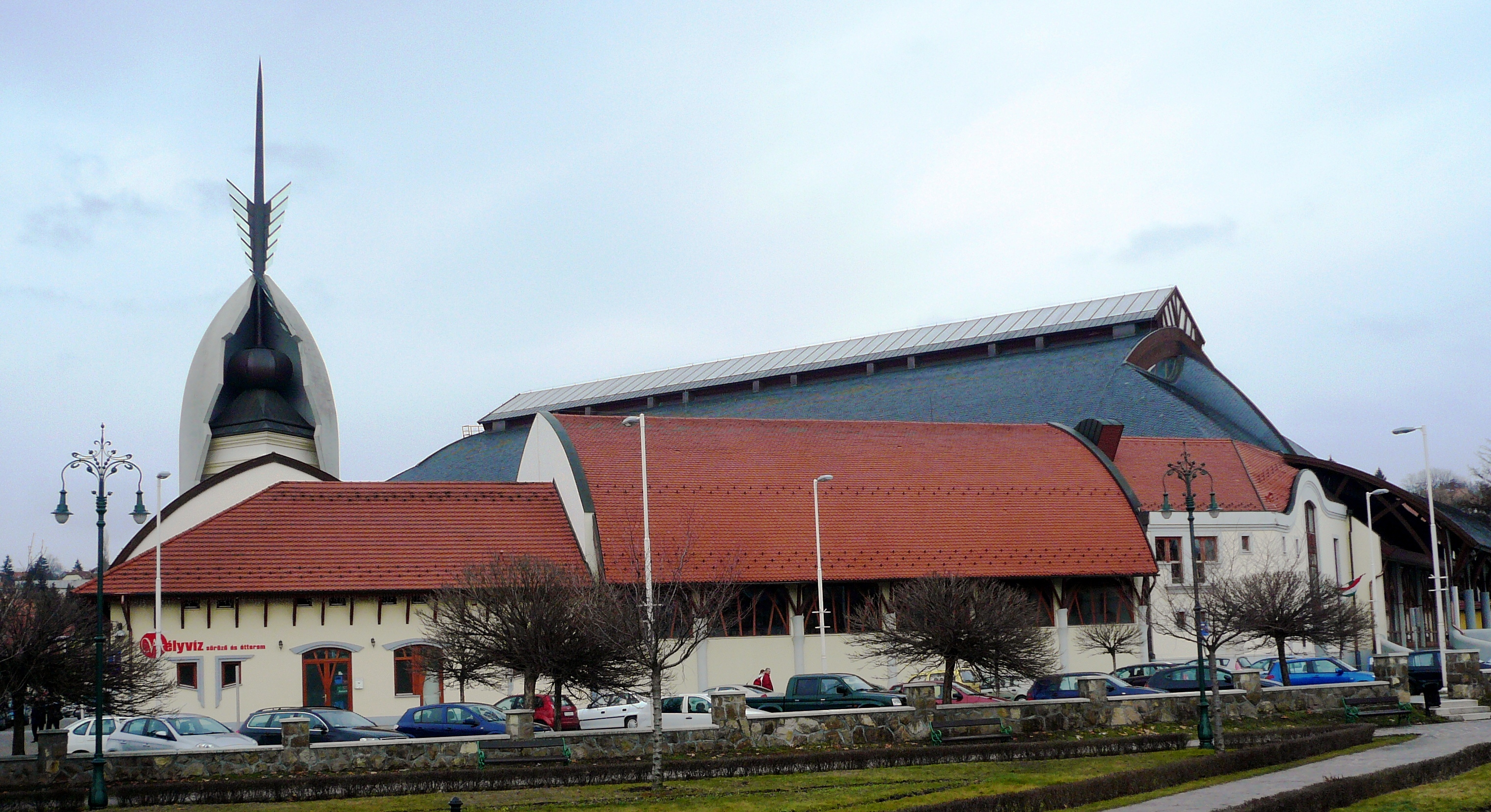 A Makovecz Imre tervezte Bitskey Aladár Sportuszoda Egerben.